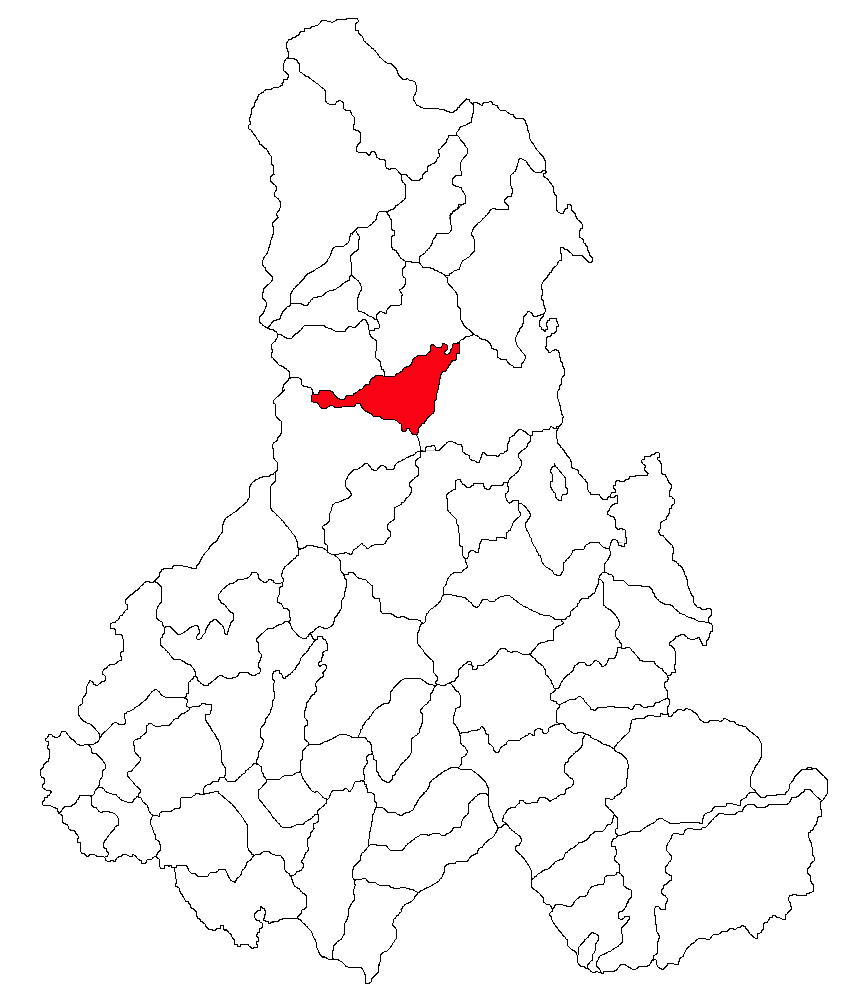 Categorie:Hărţi ale judeţului Harghita Contents 1 Licensing 2 Sursă 3 Licensing 4 Original upload log Licensing Sursă ro::Imagine:Harta_jud_Harghita.png